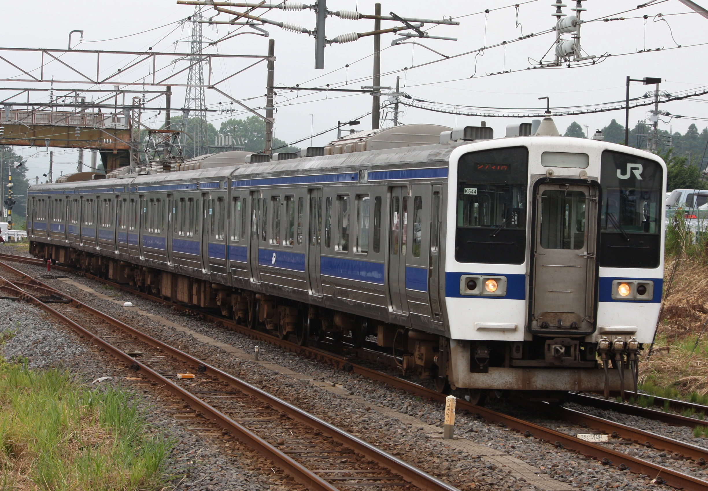 415系1500番台 常磐線 友部にて